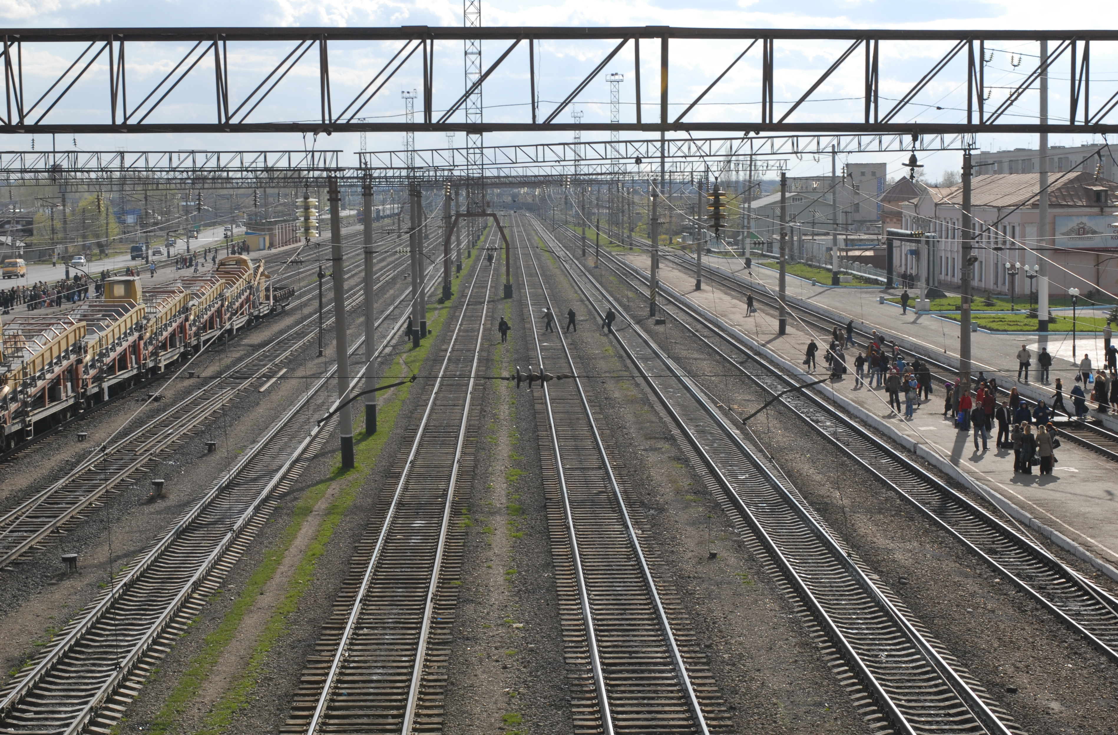 Вид с Канашского пешеходного ЖД моста на восток